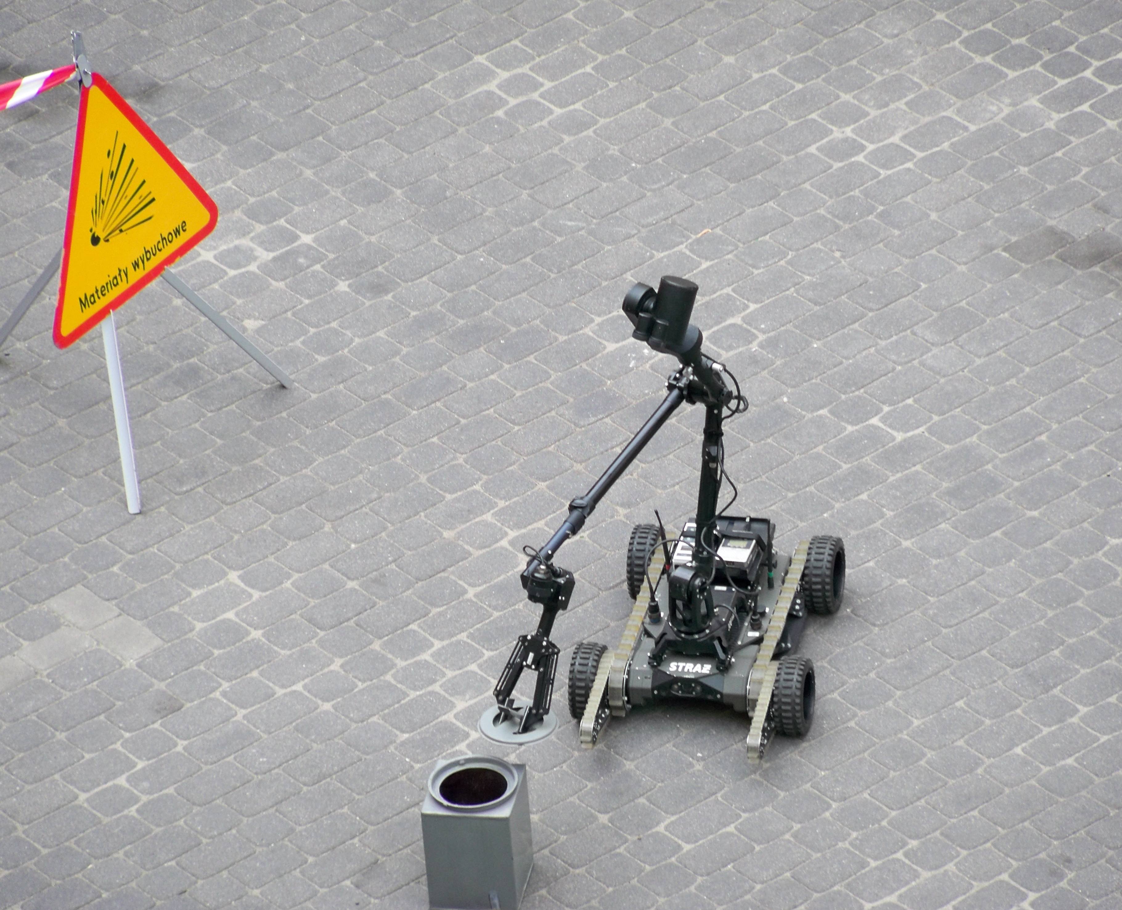 Mobilny robot rozpoznania CBRNE wykorzystywany przez specjalistyczne grupy ratownictwa chemiczno-ekologicznego państwowej straży pożarnej.